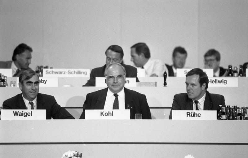 11.-13.9.1989 37. Bundesparteitag der CDU in der Bremer Stadthalle